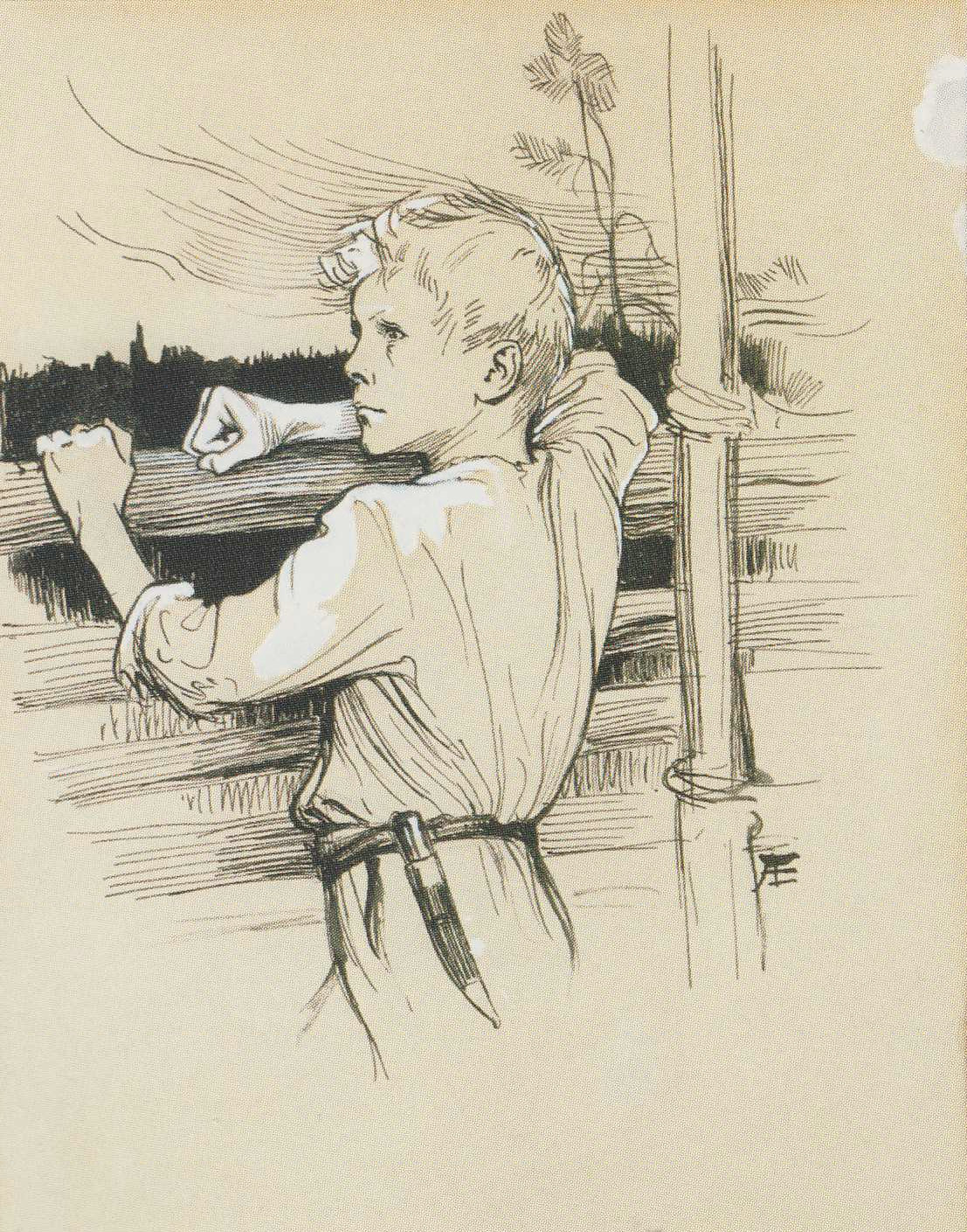 Albert Edelfeltin Vänrikki Stoolin tarinoiden kuvitukseen sisältyvä piirros runosta "Sotilaspoika".